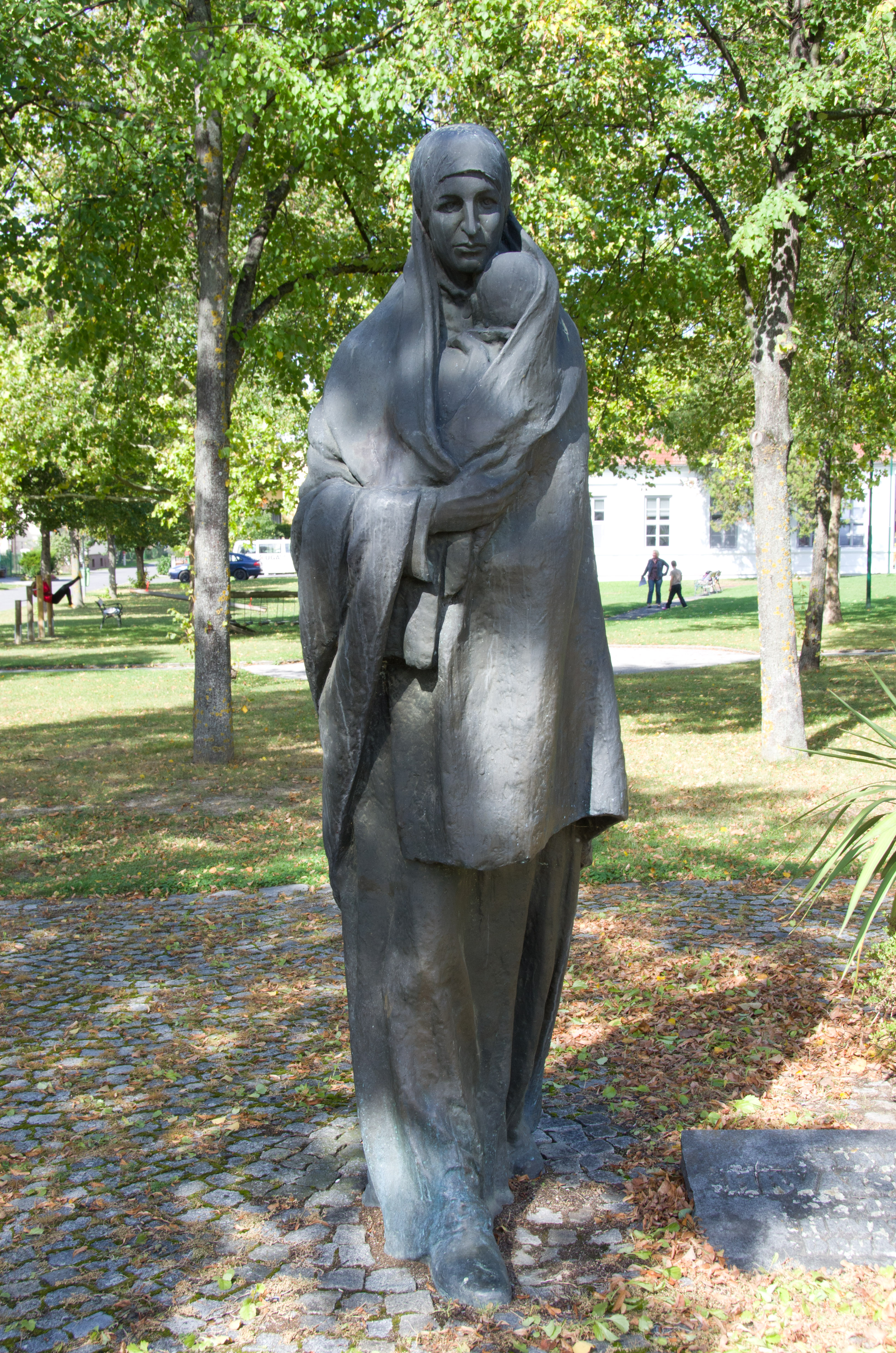 Bronzefigur Mutter mit Kind